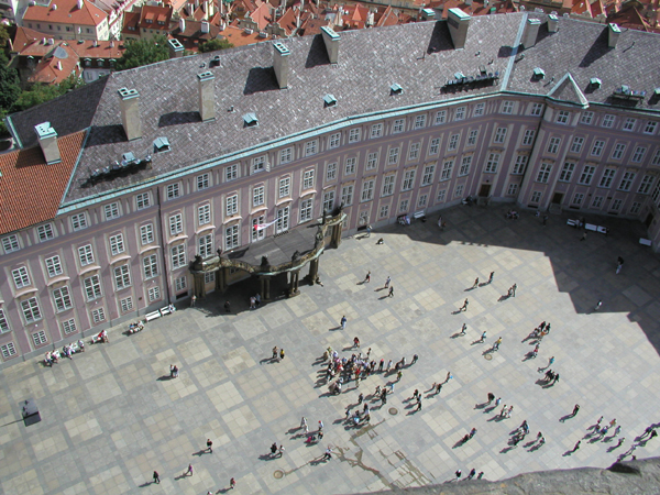 Pražský hrad, 3. nádvoří